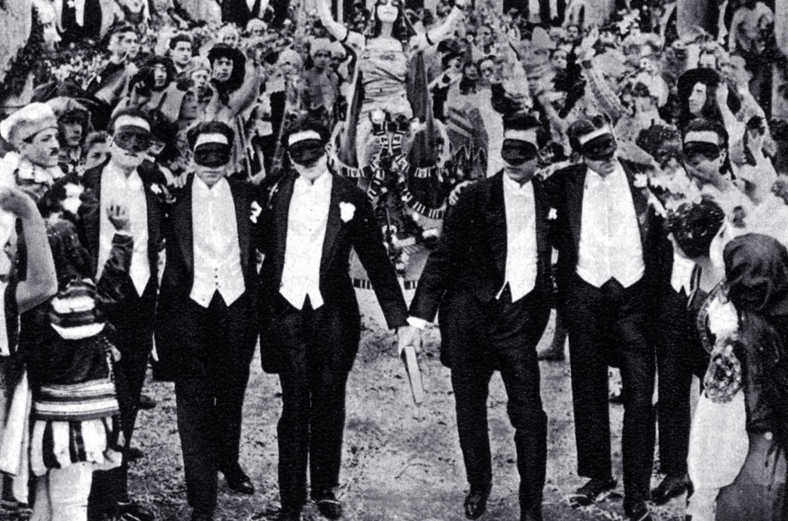 Fotogramma de La signora delle rose, regia di Diana Karenne, produz "Tiber Film", Roma, 1919